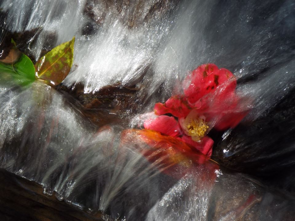 Camellia japonica Mt.NIshigatake .Tambasasayama,西ヶ嶽落ち椿